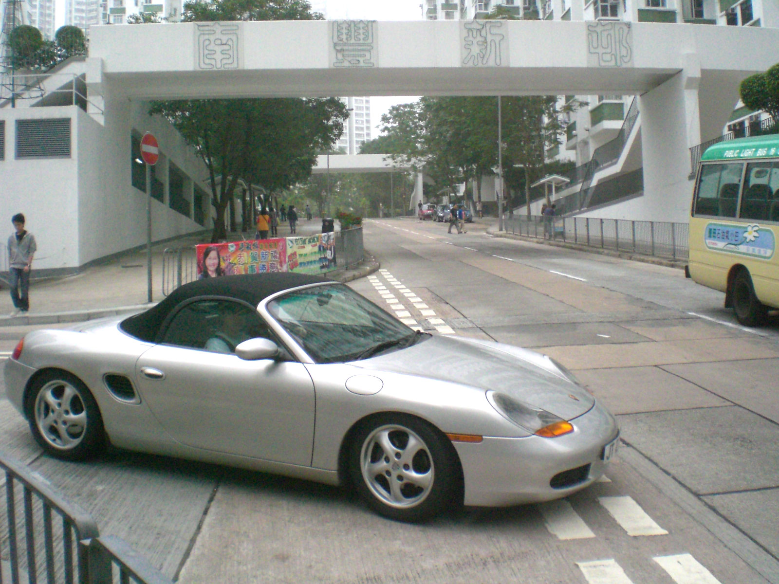 南豐新邨 基利路 與 基利坊 交界 跑車